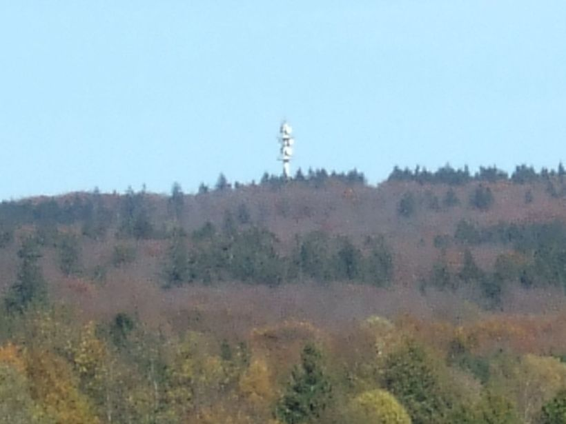 Rösterkopf